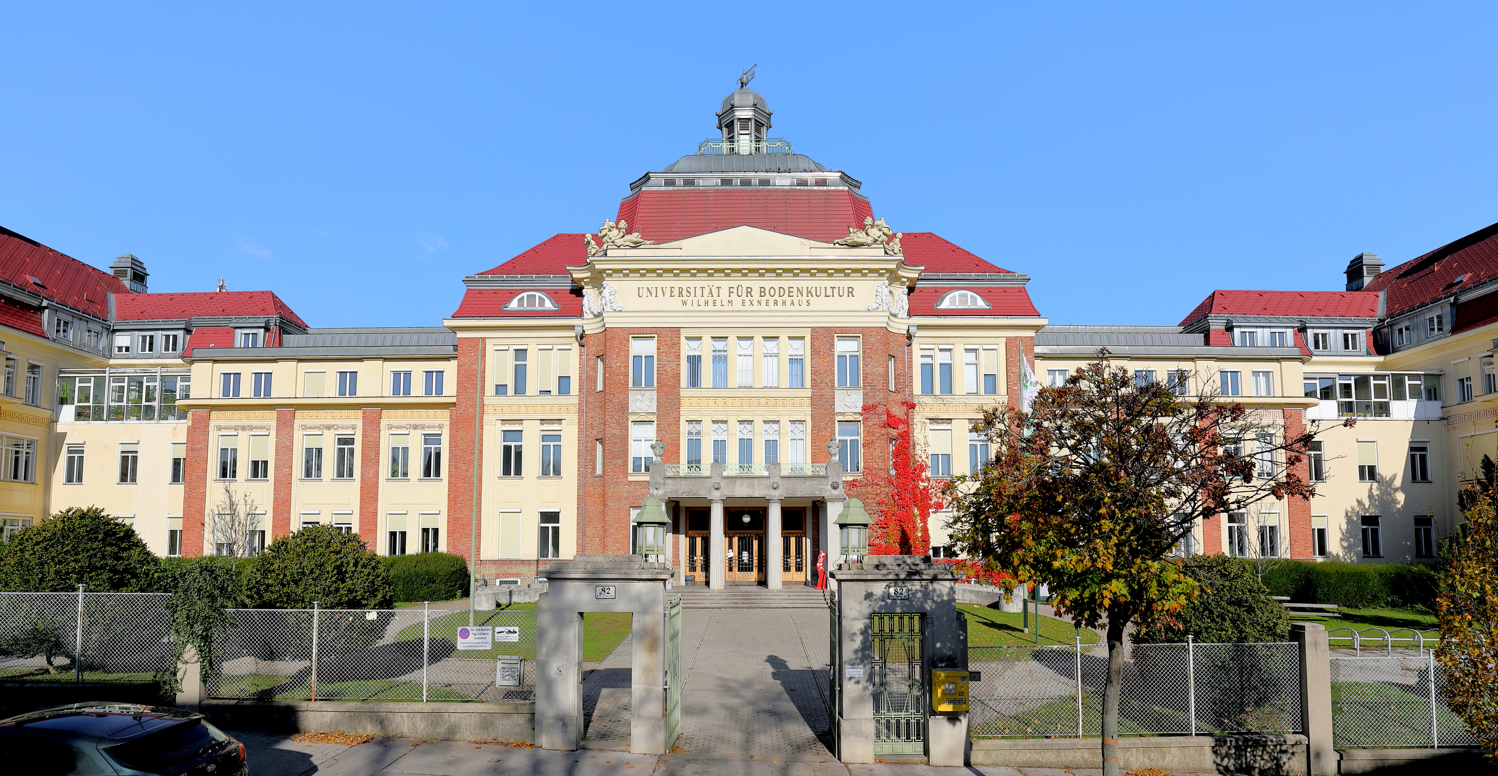 Südansicht des Wilhelm-Exner-Hauses in Oberdöbling, ein Bezirksteil des 19. Wiener Bezirkes Döbling.Die Gebäude wurde Ende der 1900er Jahre als Krankenhaus für die Wiener Kaufmannschaft nach Plänen des Architekten Ernst Gotthilf von Miskolczy errichtet. 1939 kam es in den Besitz der Stadt Wien, die es später an die deutsche Luftwaffe verpachtete. Nach dem Krieg wurde es zuerst von den Sowjets beschlagnahmt und anschließend von den Amerikanern. Seit 1960 wird es von der Universität für Bodenkultur als Nebenstandort genutzt und in Gedenken an Wilhelm Exner als Wilhelm-Exner-Haus bezeichnet.